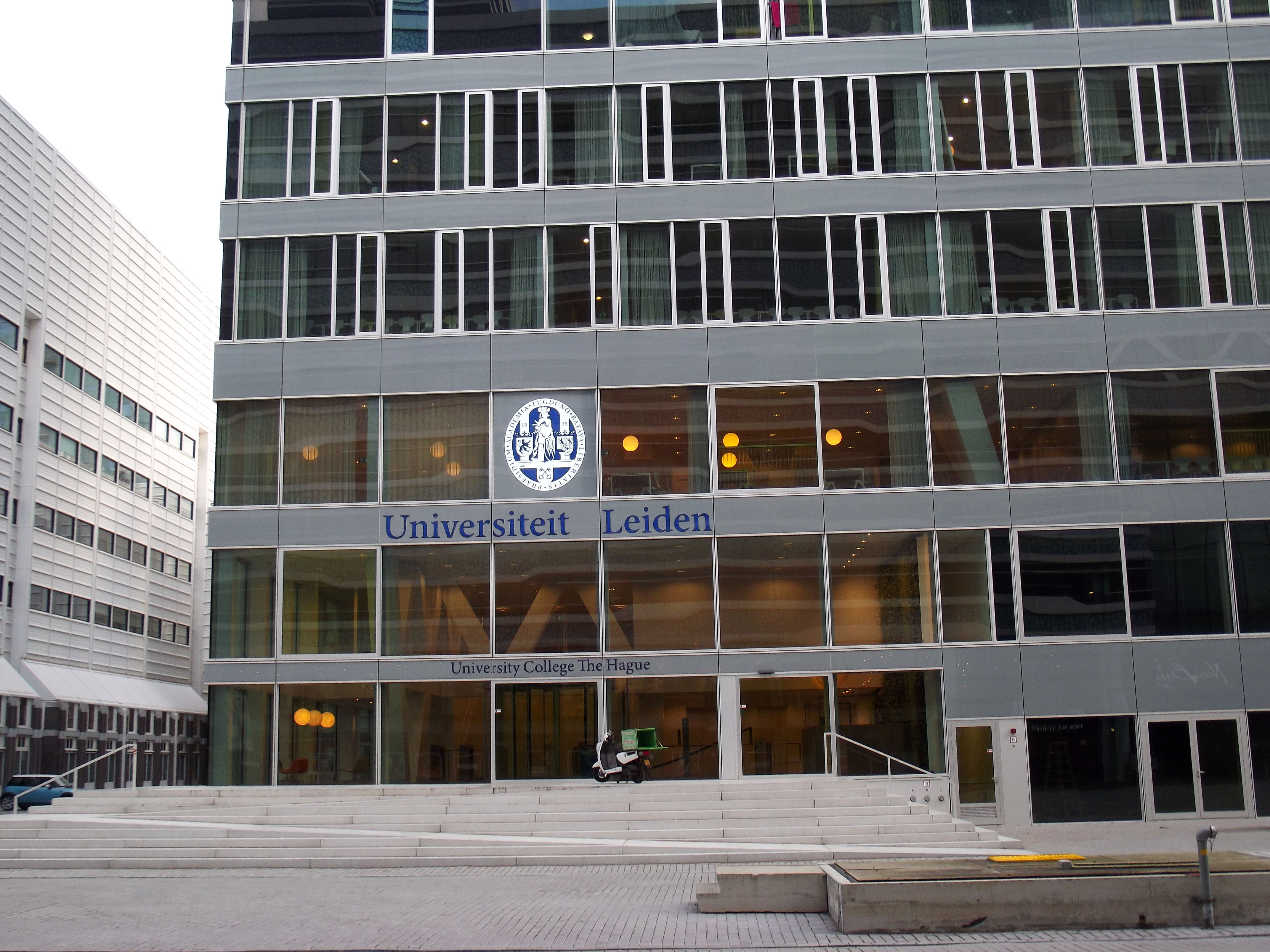 Engelstaligecampus van de Universiteit Leiden. De studenten hebben een all-in contract waarbij zij in hetzelfde gebouw wonen en studeren.